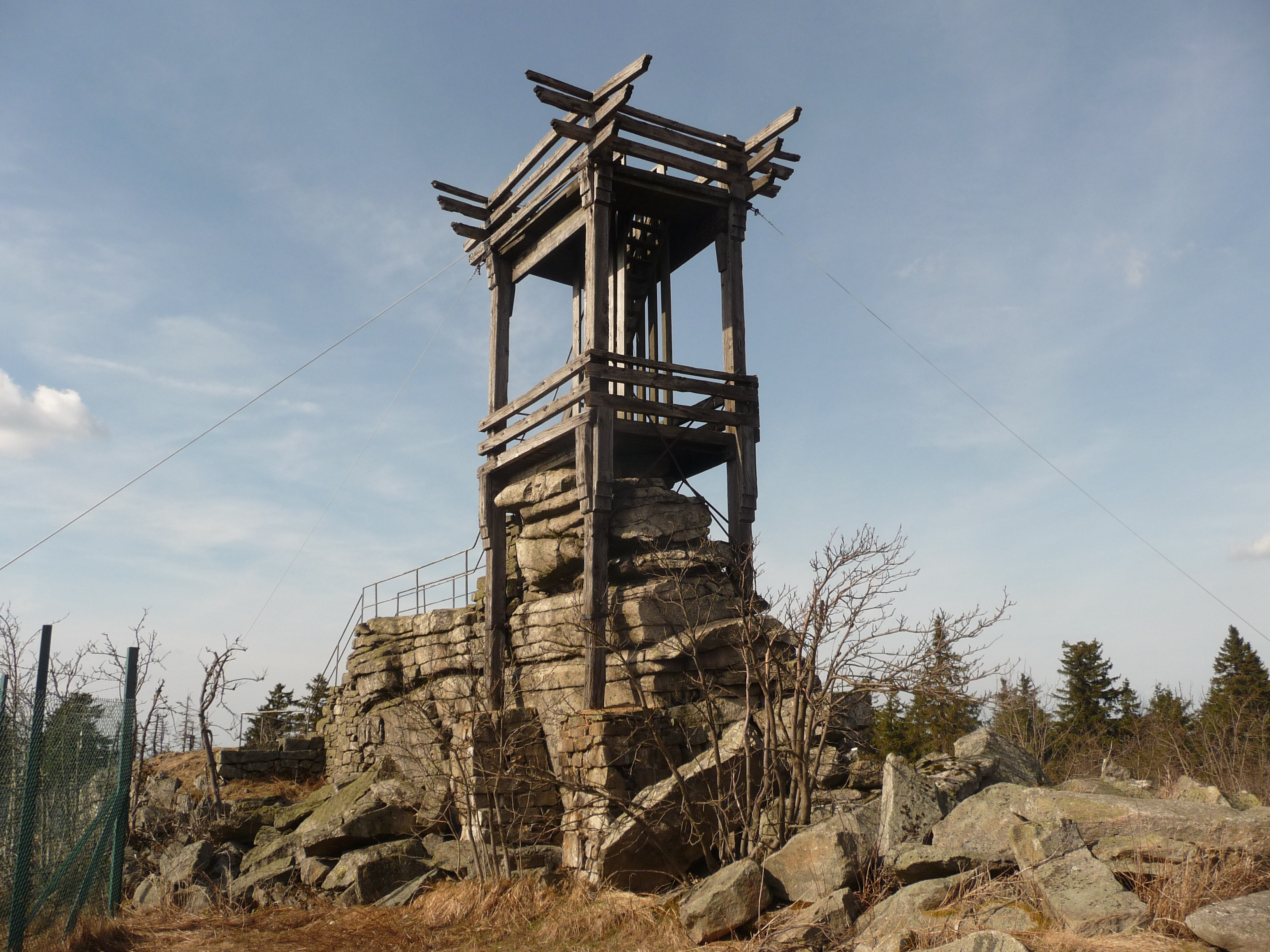 Backöfele - Aussichtsplattform auf dem Schneeberg, spätmittelalterlicher Wartturm